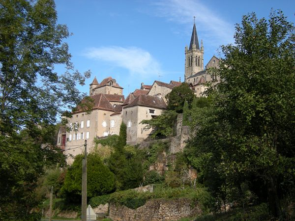 Faycelles (département du Lot, France)